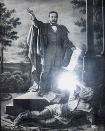 Litografia realizată la Viena a alegoriei făcute de Mișu Popp pentru imnul național românesc "Deșteaptă-te române"